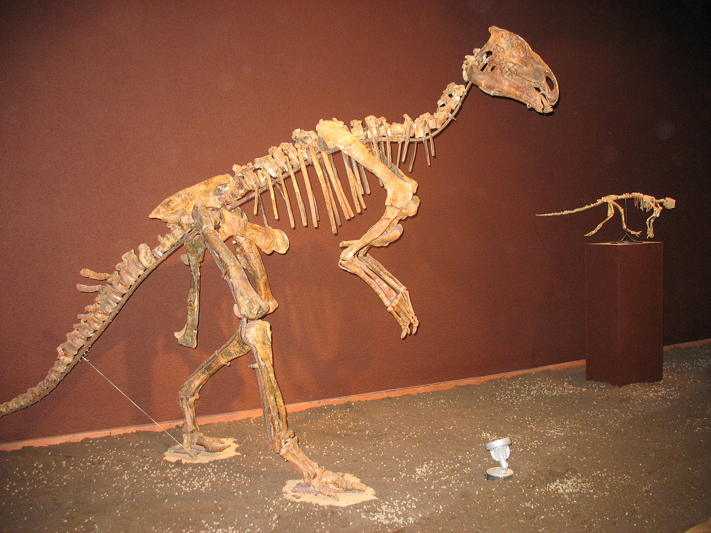 Il tesoro paleontologico della Russia